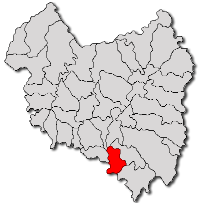 Categorie:Hărţi ale judeţului Covasna